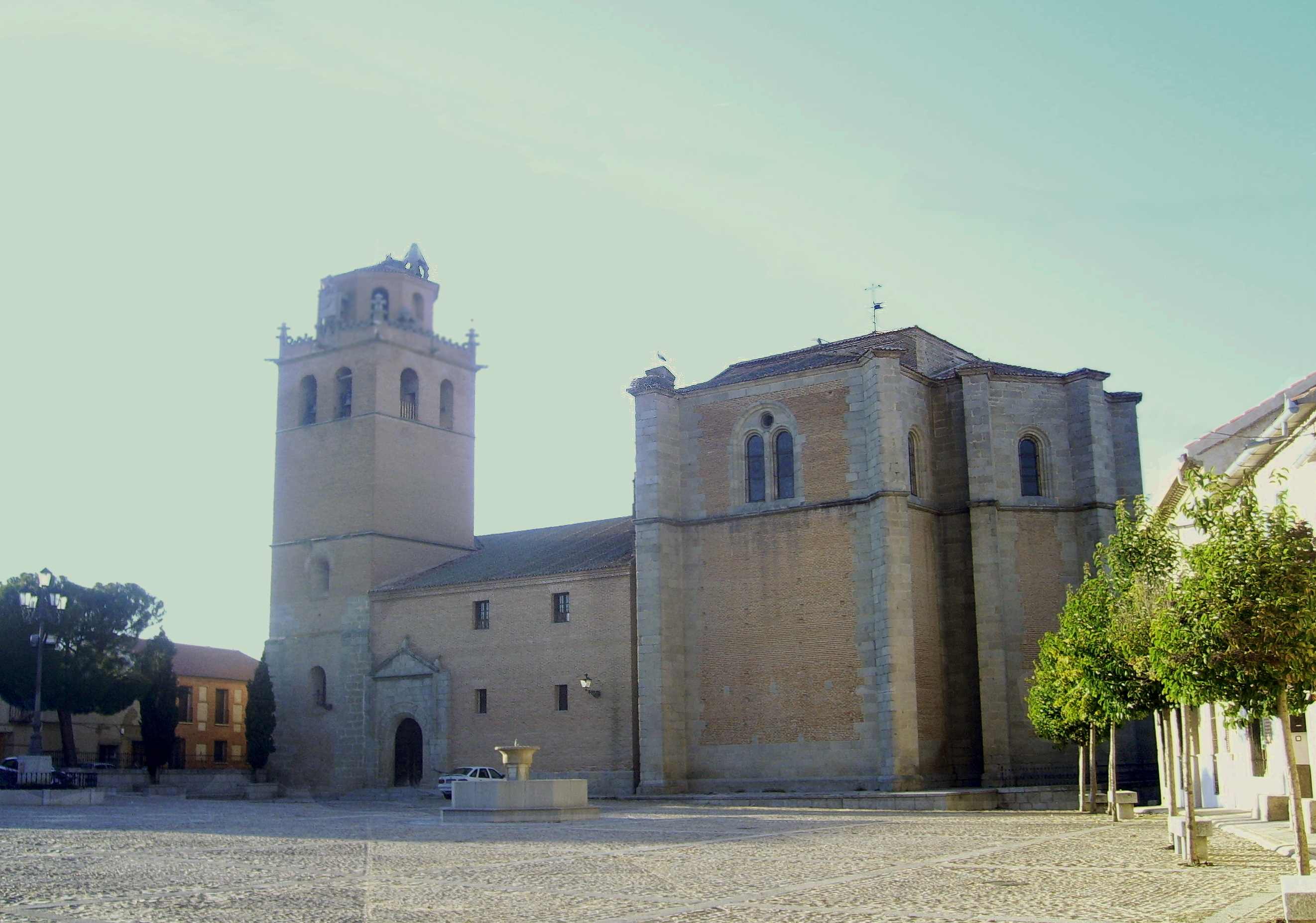 Iglesia parroquial de Nuestra Señora de la Asunción (Martín Muñoz de las Posadas)